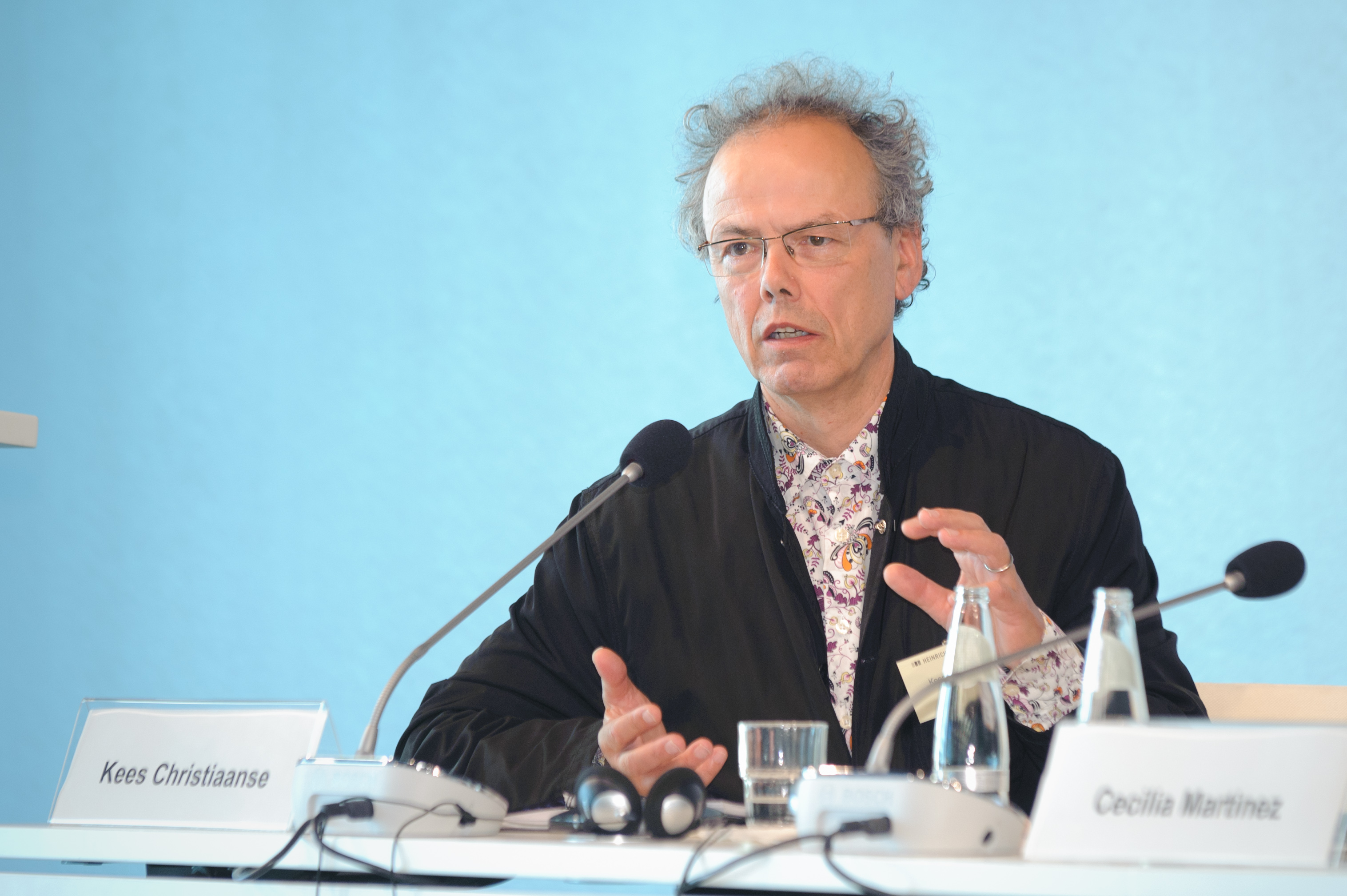 Kees Christiaanse (Prof. f. Architektur u. Städtebau, ETH Zürich) Foto: Stephan Röhl